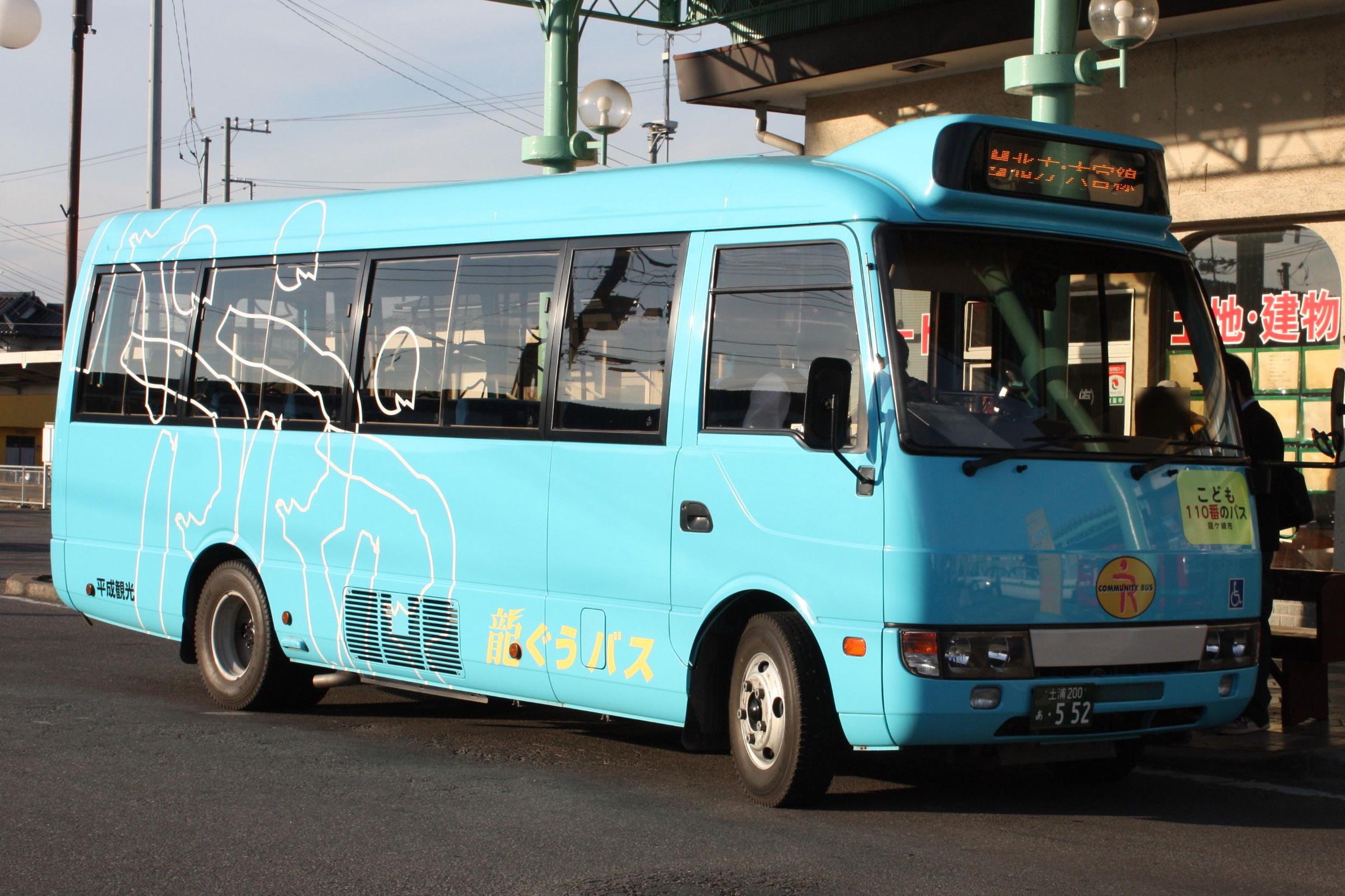 龍ぐうバス 主にBルートに使用される車両 竜ヶ崎駅にて